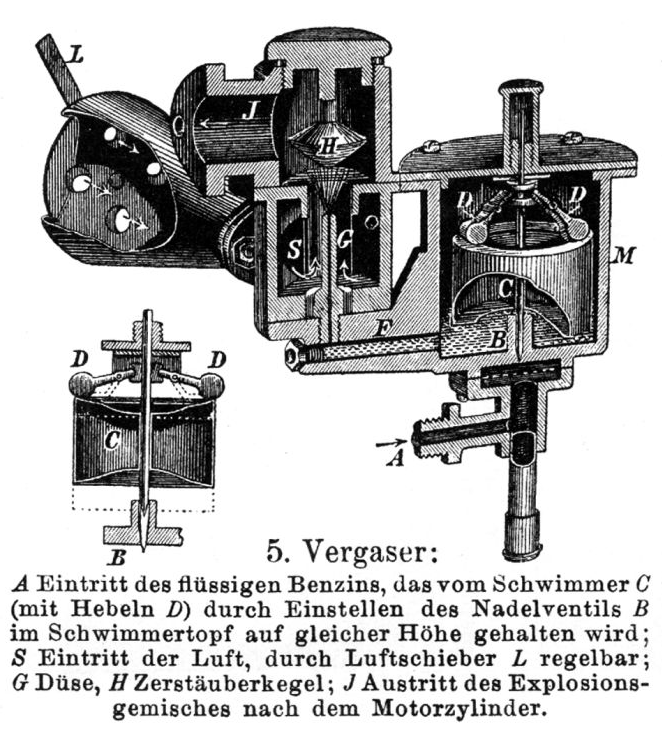 Vergaser: A Eintritt des flüssigen Benzins, das vom Schwimmer C (mit Hebeln D) durch Einstellen des Nadelventils B im Schwimmertopf auf gleicher Höhe gehalten wird; S Eintritt der Luft, durch Luftschieber L regelbar; G Düse, H Zerstäuberkegel; J Austritt des Explosionsgemisches nach dem Motorzylinder.